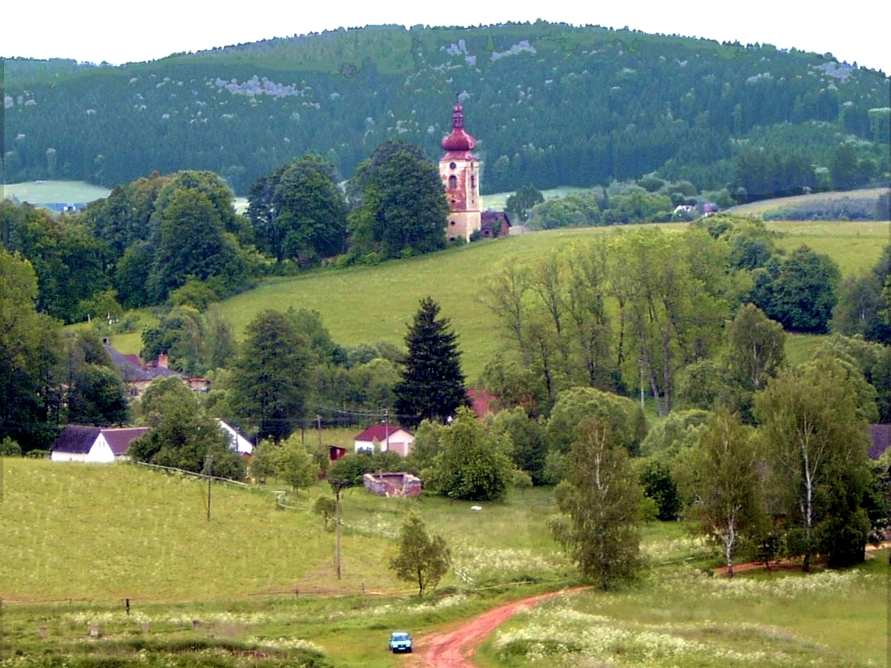 Prostřední Staré Buky záběr z pastvin.